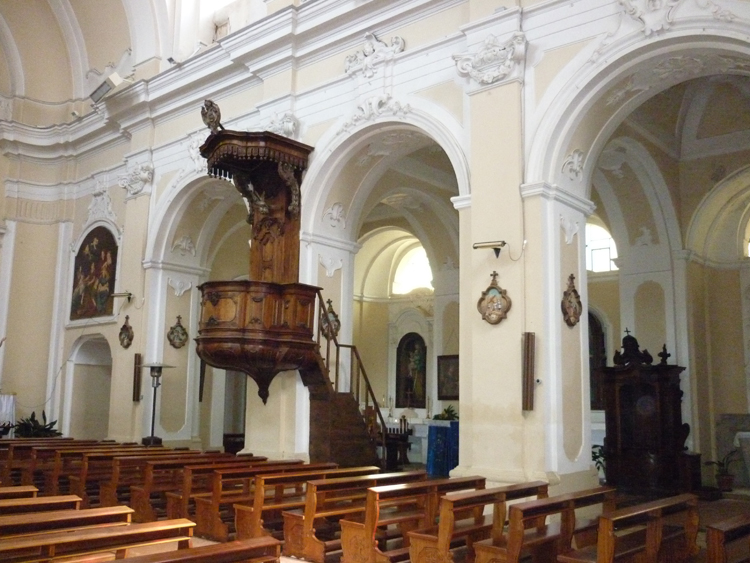 San Giovanni in Fiore - Chiesa Madre, navata laterale destra